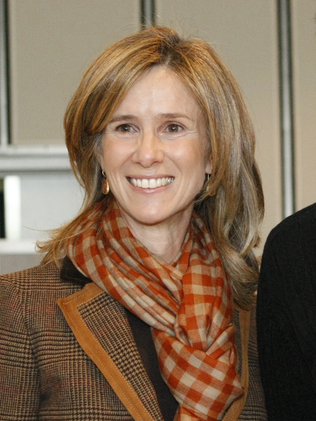 Ministra de Ciencia e Innovación, Cristina Garmendia